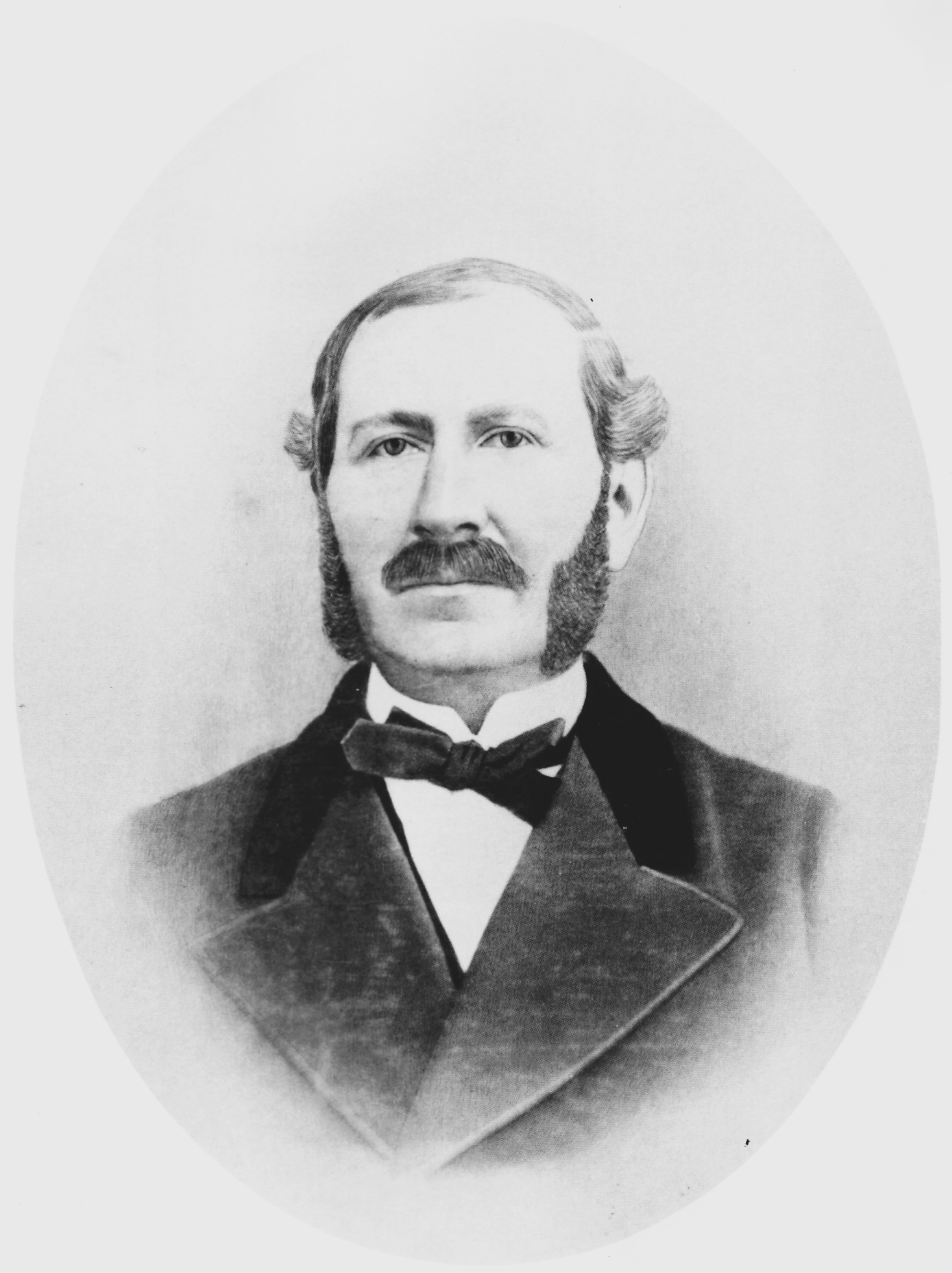 Philipp Wilhelm Plessing (* 1823; † 17. Mai 1879), Lübecker Politiker